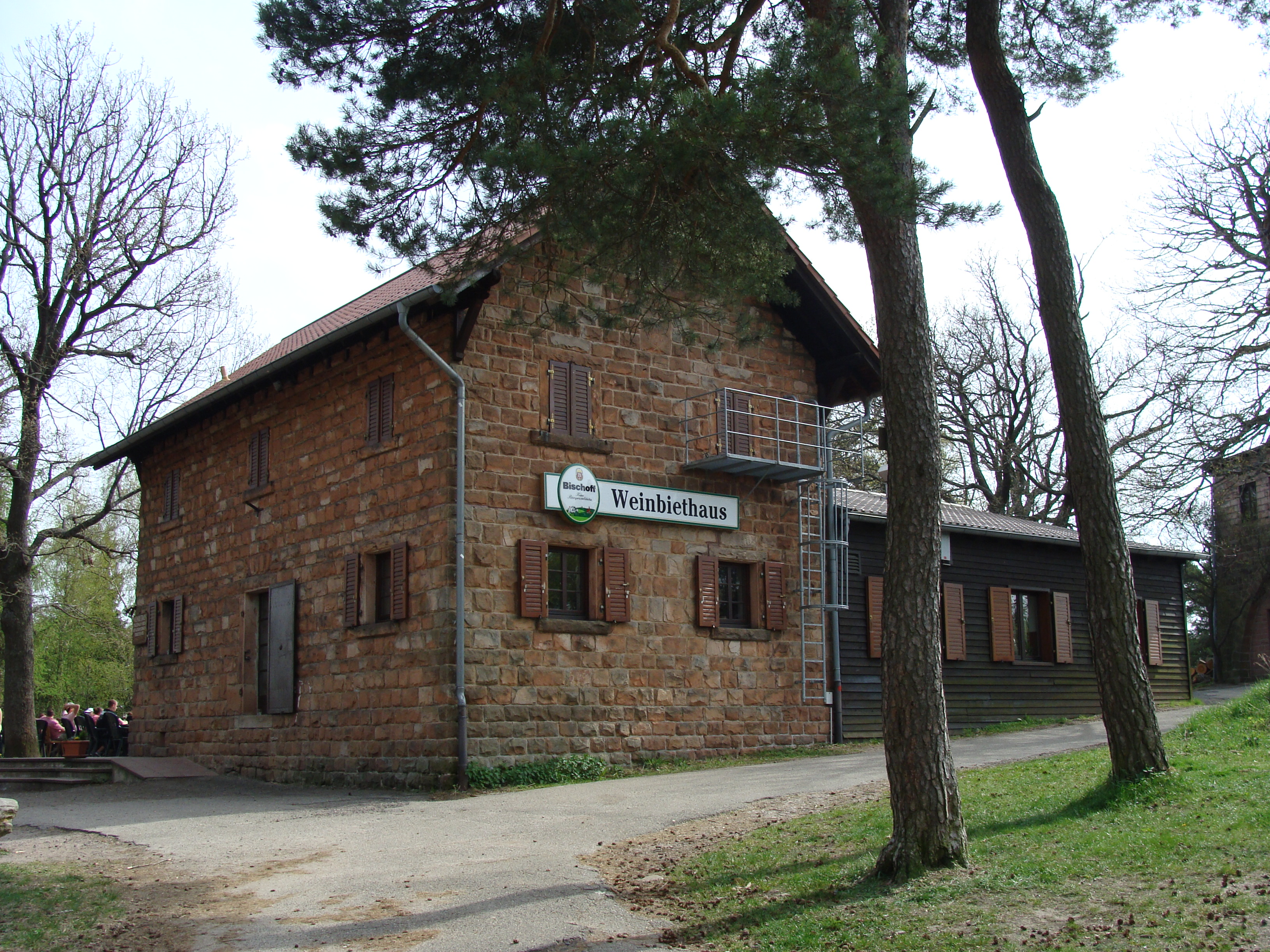 Weinbiethaus auf dem Gipfel des Weinbiet im Pfälzer Wald